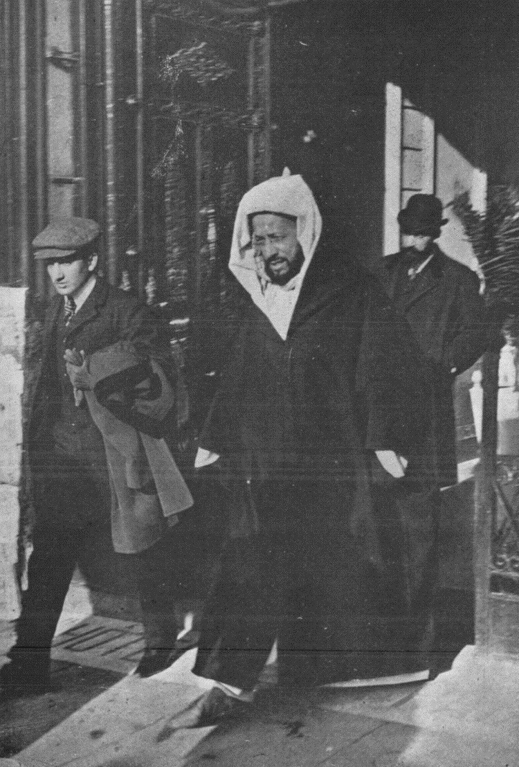 "La diplomatie marocaine à Algésiras. Sidi Mohammed-el-Mokri, délégué du sultan du Maroc, à son arrivée à Algésiras".